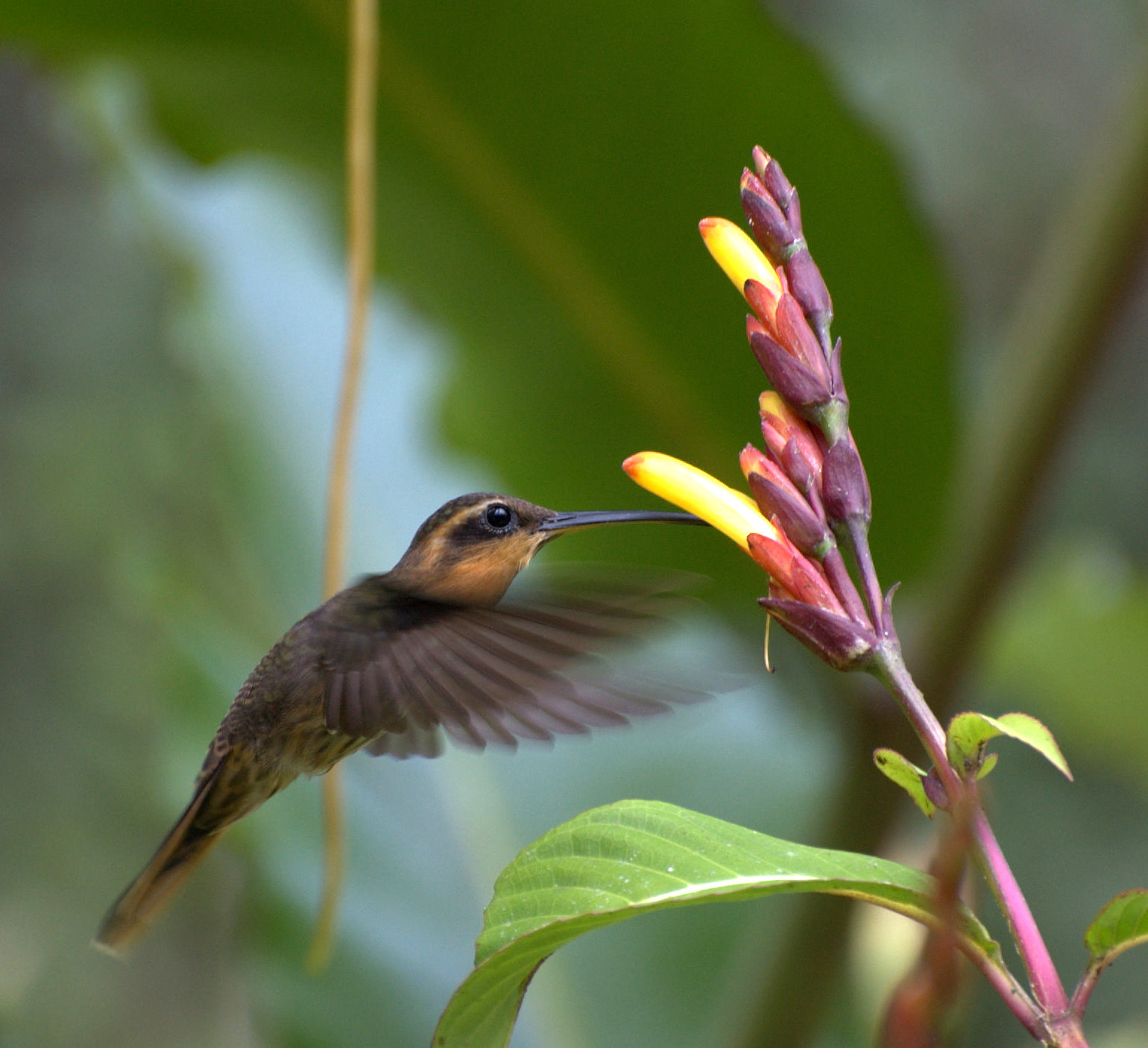 Folha Seca - Ubatuba-SP - Brasil